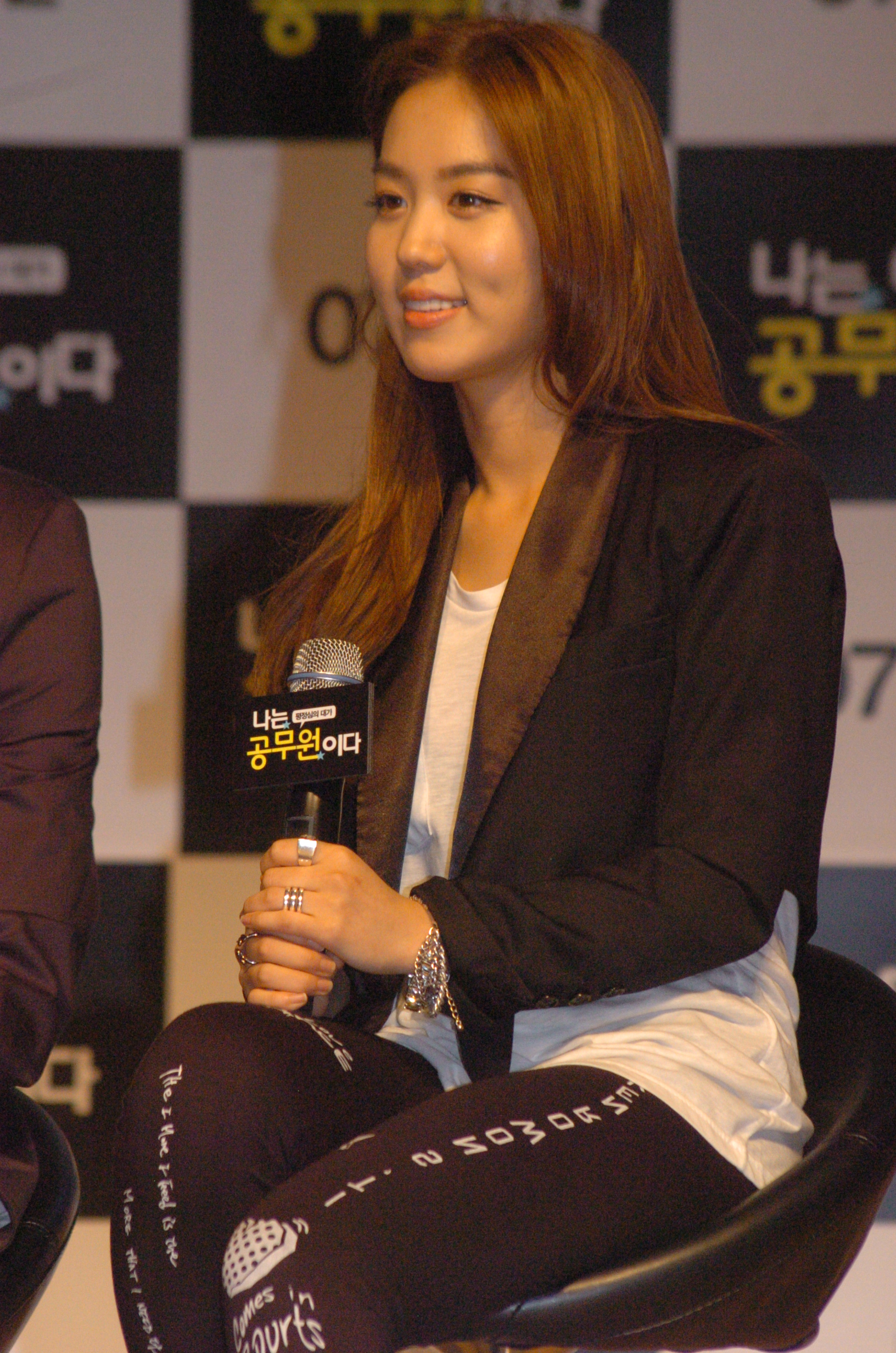 나는 공무원이다 제작보고회